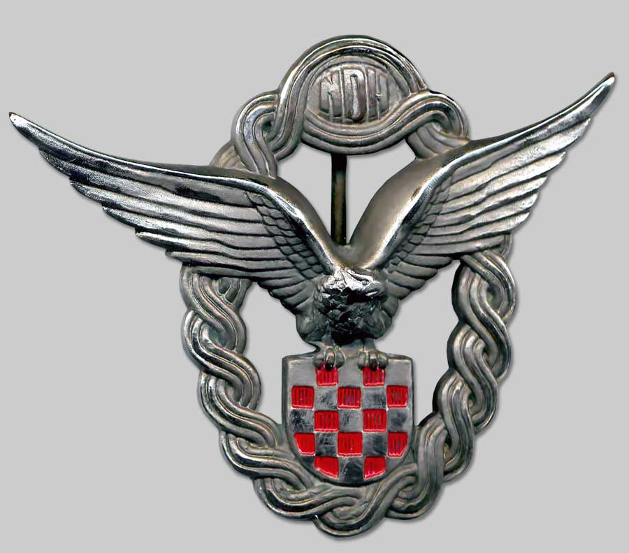 značka zrakoplovstva NDH